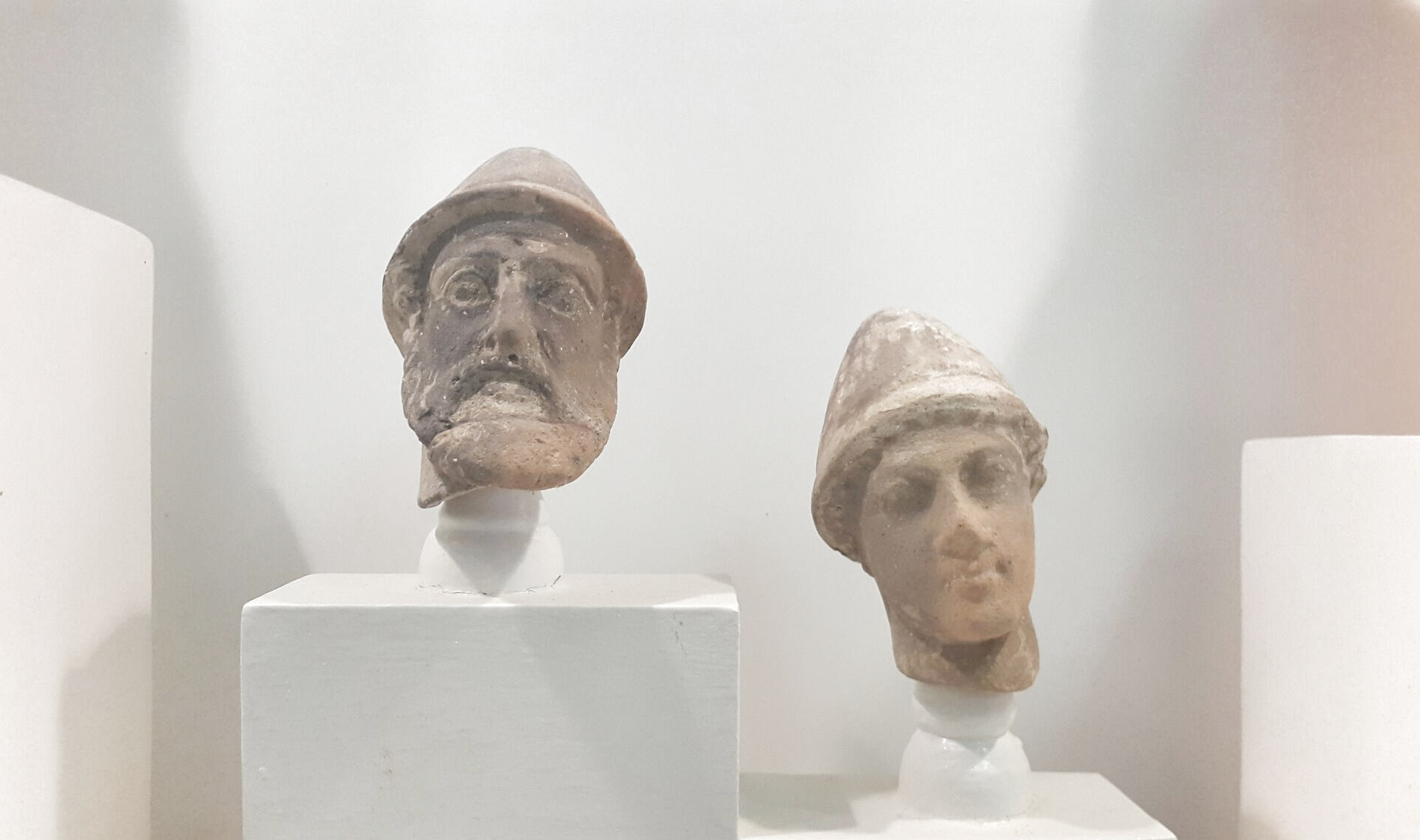 tête d’un dieu barbu et tête d’un dieu jeune, 3 ème siècle avant J.C. Musée de Kerkouane